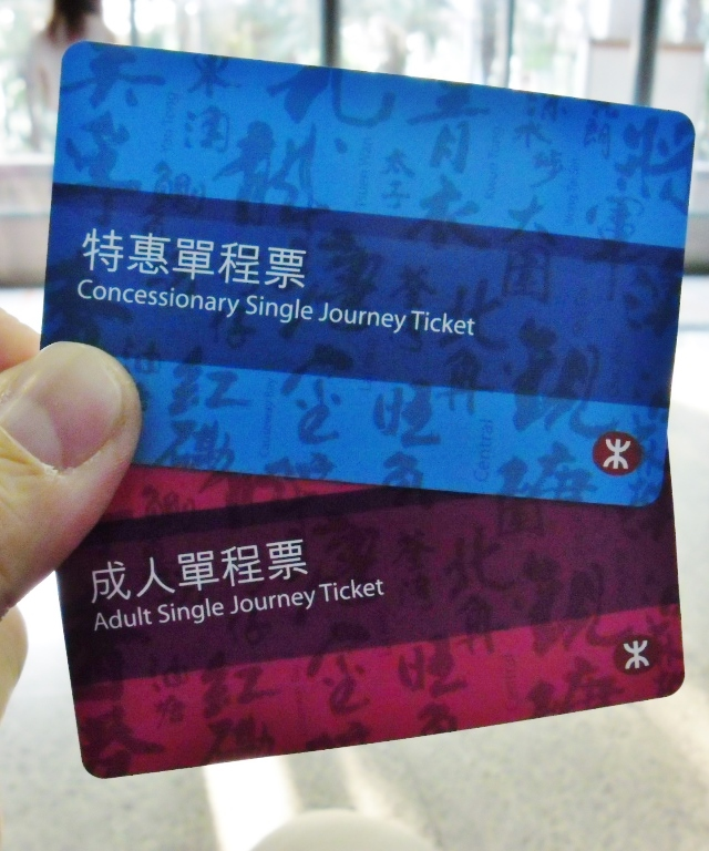 中文（香港）: 港鐵重鐵的多用途智能車票，2013年10月開始有售